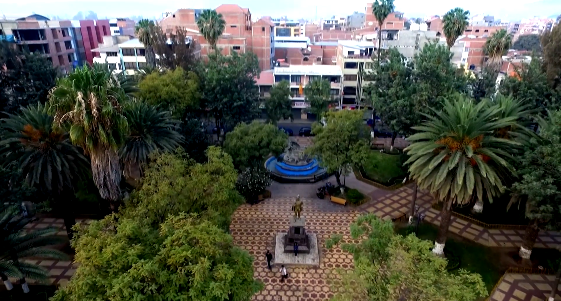 El centro de Quillacollo - Plaza Bolivar.